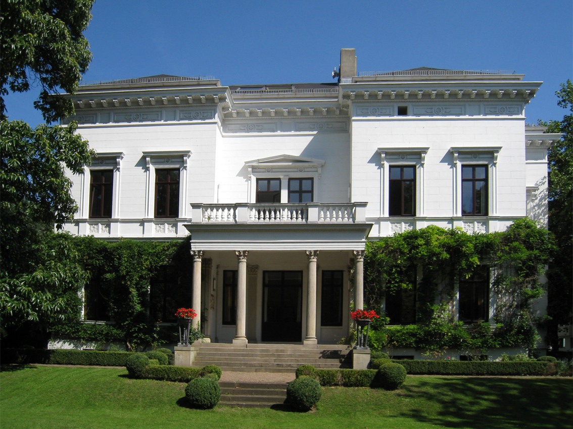 Villa Lürmann, Import- und Exporthandlung Lohmann und Co. in Bremen, Contrescarpe 21 / Meinkenstraße.Das abgebildete Objekt ist ein geschütztes Kulturdenkmal in der Freien Hansestadt Bremen, mit der Nr. 0275 beim Landesamt für Denkmalpflege registriert.